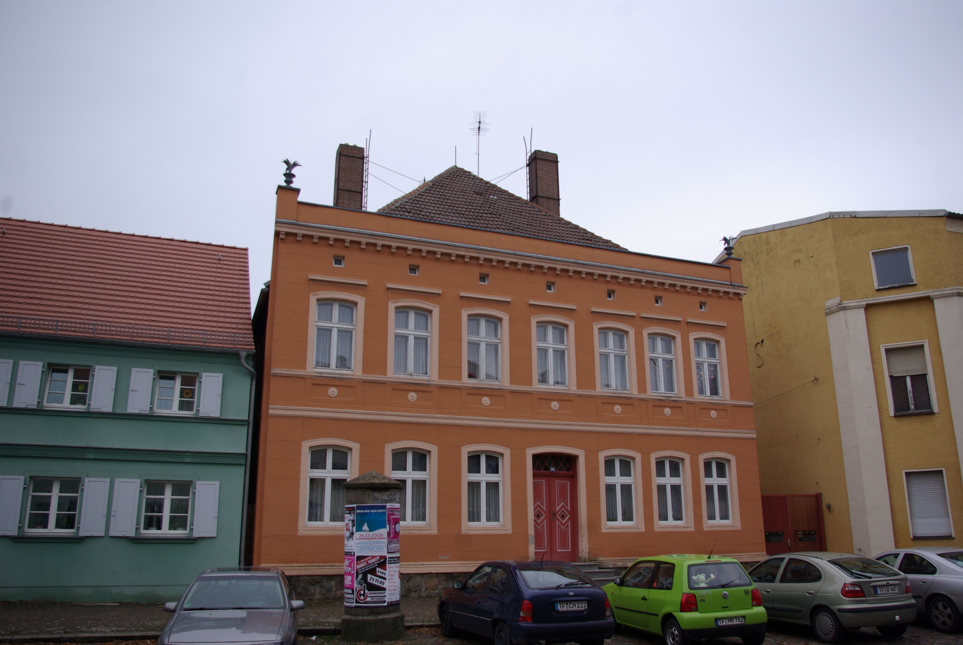 Jüterbog in Brandenburg. Das Haus in der Großen Strasse 99 steht unter Denkmalschutz.